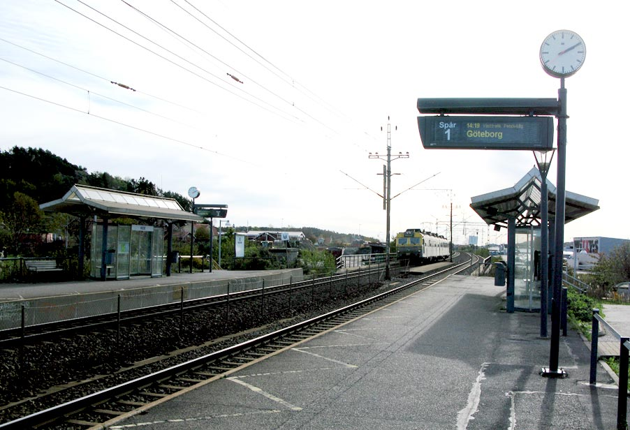 Hede pendeltågsstation, Kungsbacka kommun, Halland